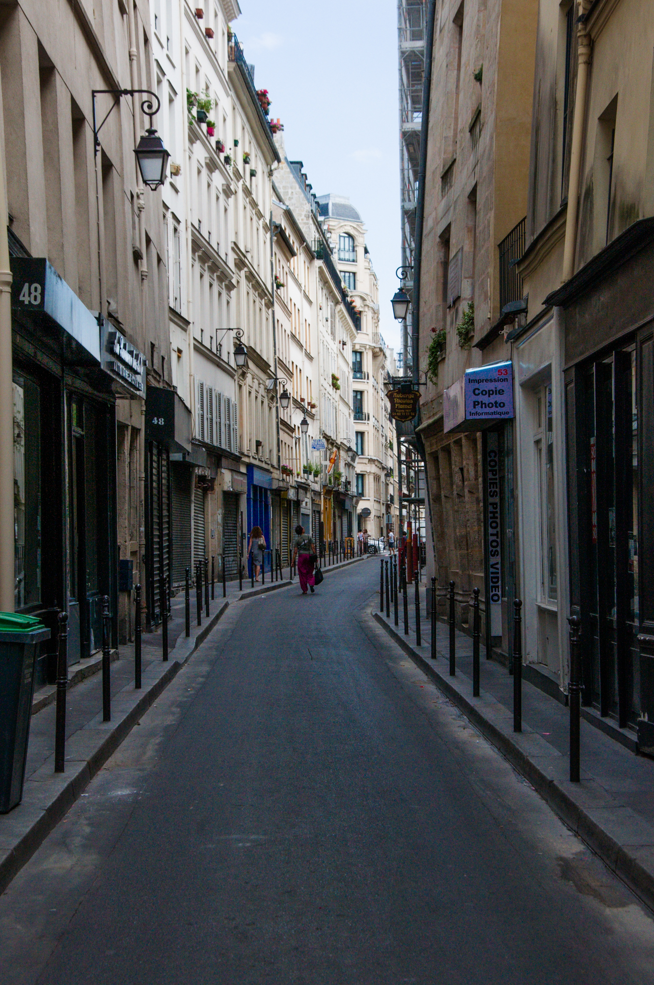 Rue de Montmorency (Paris)